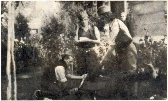 Srpskohrvatski / српскохрватски: Četnička trojka kolje. Jedan od prisutnih čita presudu.